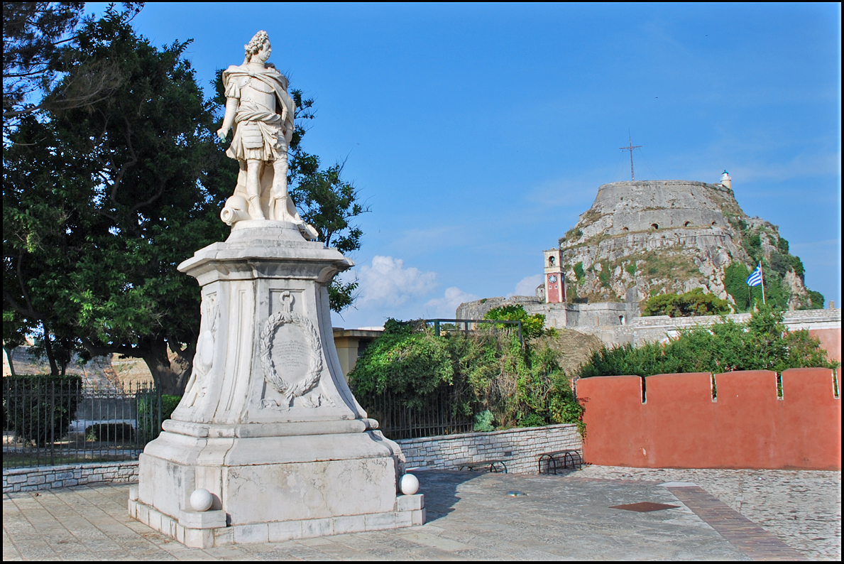 Корфу, Керкира